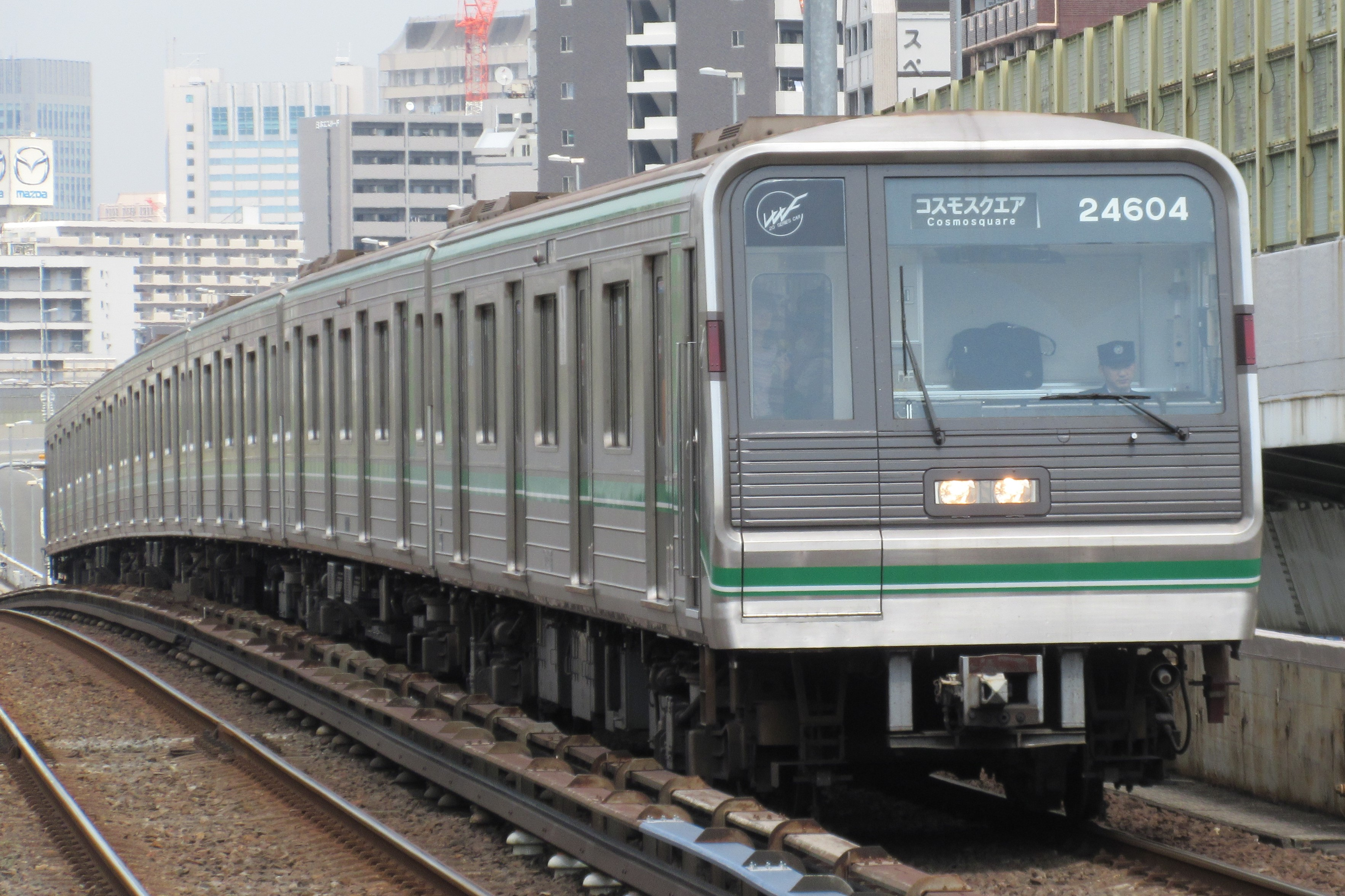 大阪市営地下鉄24604 (九条駅にて)